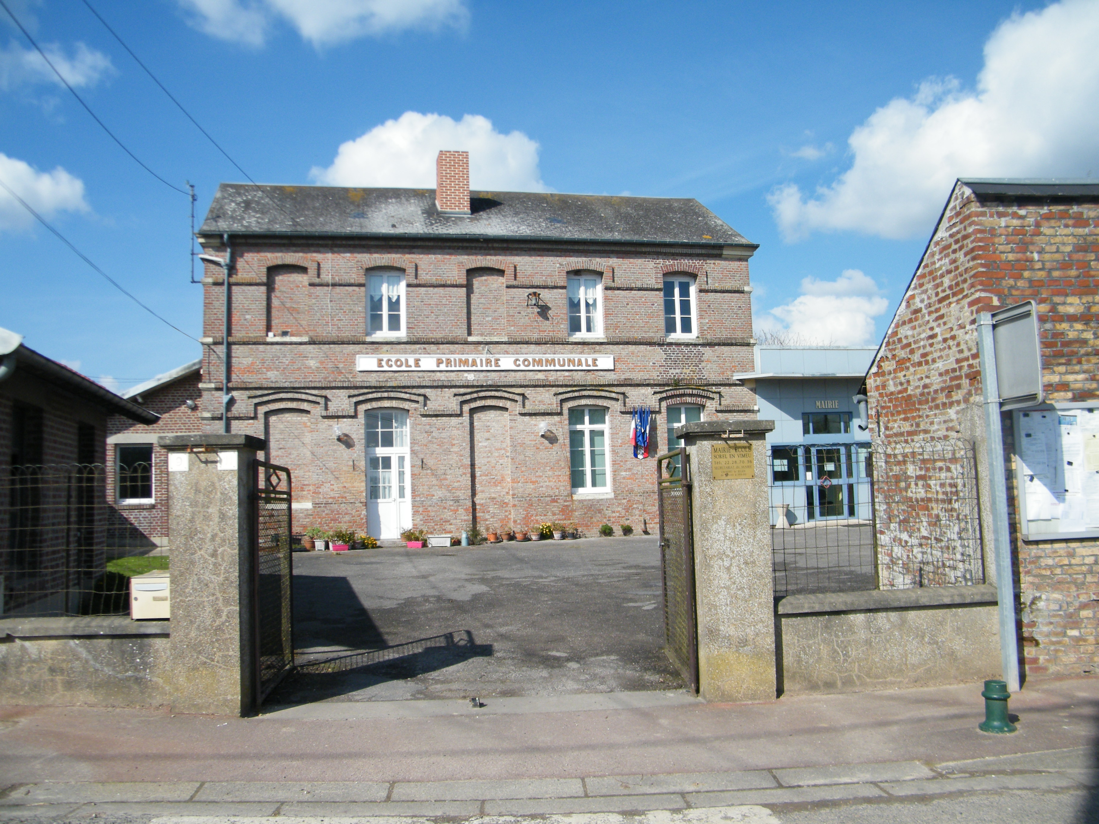 La mairie.